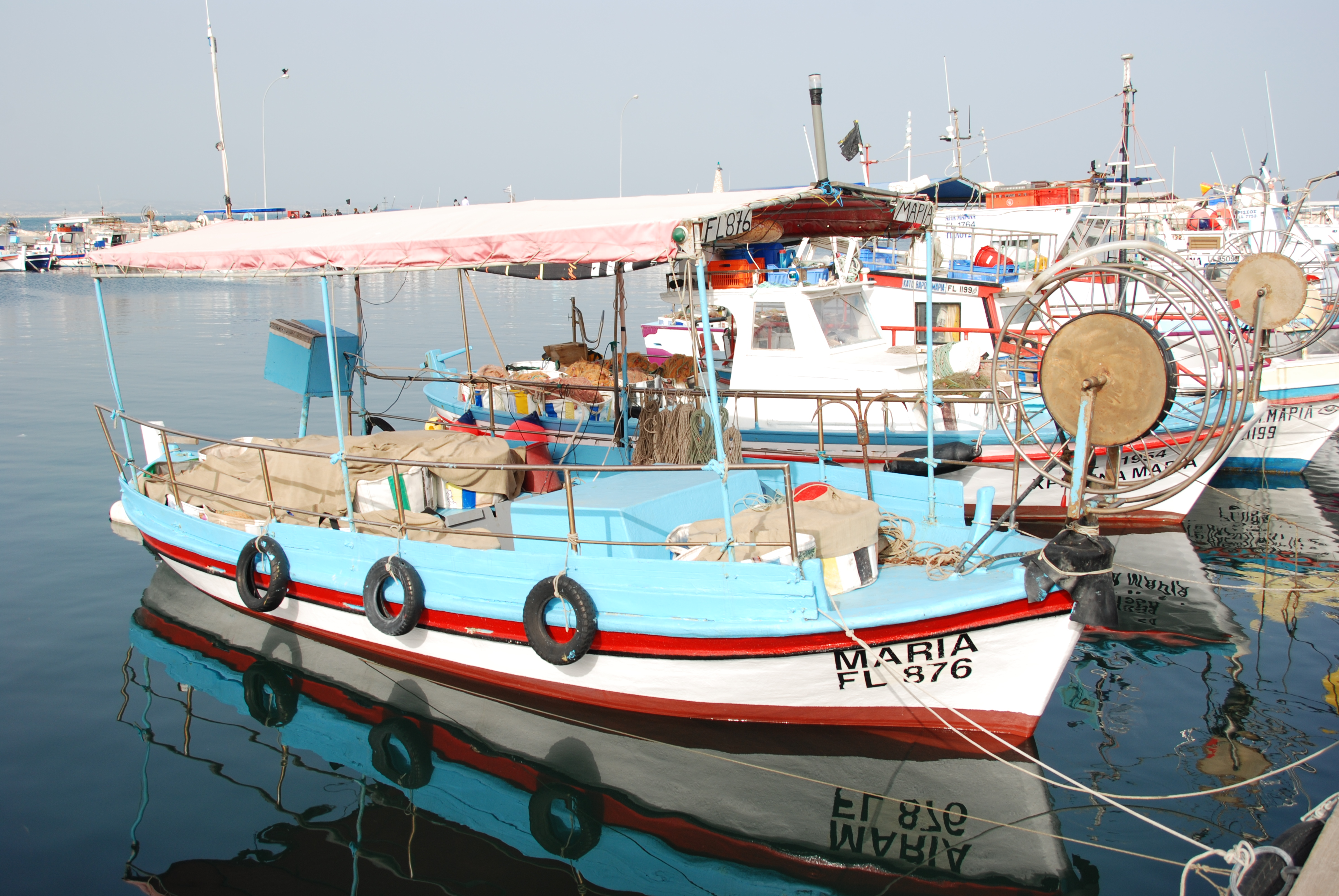 Larnaka Waterfront Λάρνακα